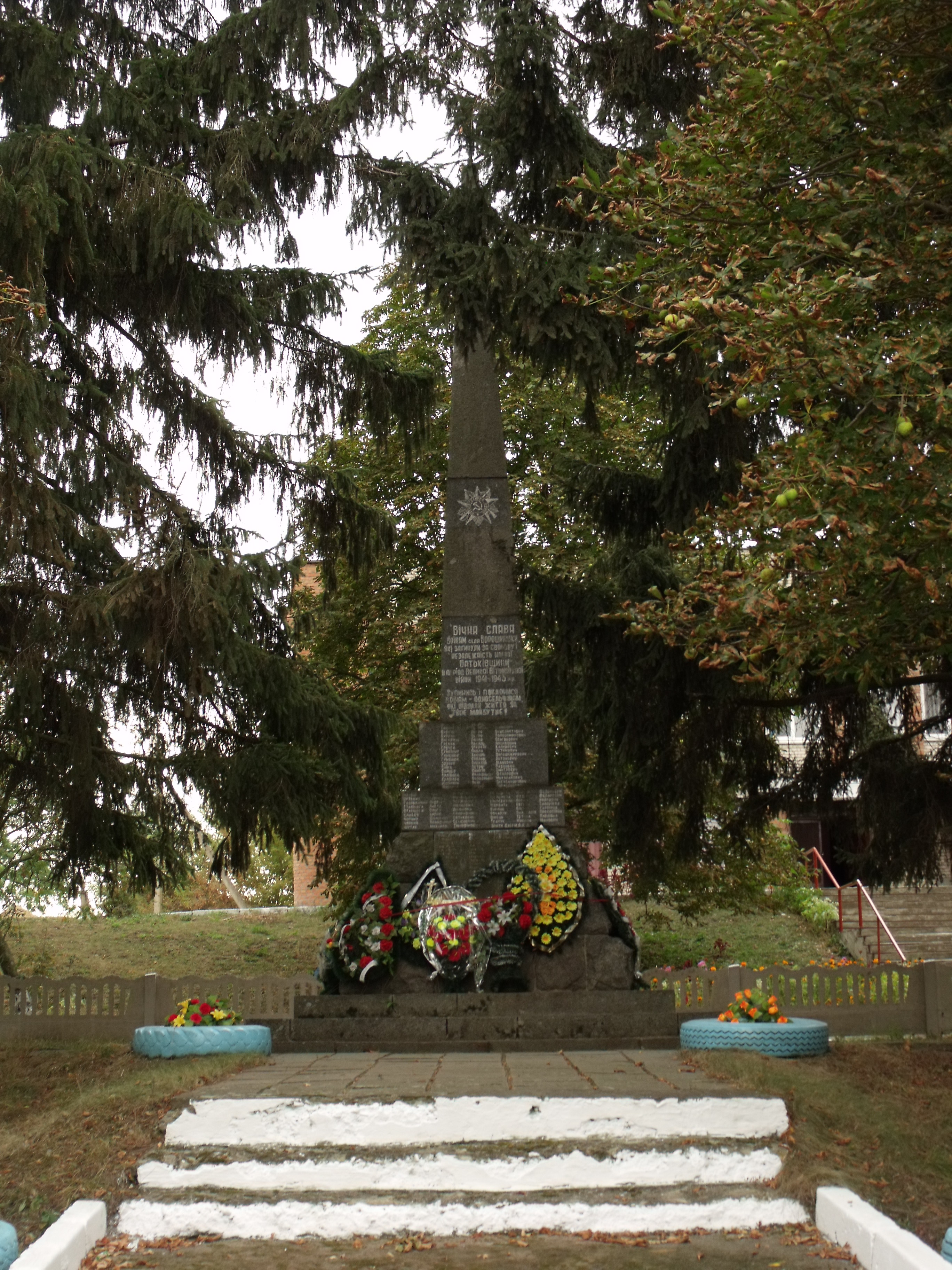 Пам’ятник 75 воїнам – односельчанам, загиблим на фронтах ВВВ: Вінницька область, Тиврівський район, с. Ворошилівка, Ворошилівська с/р, в центрі села